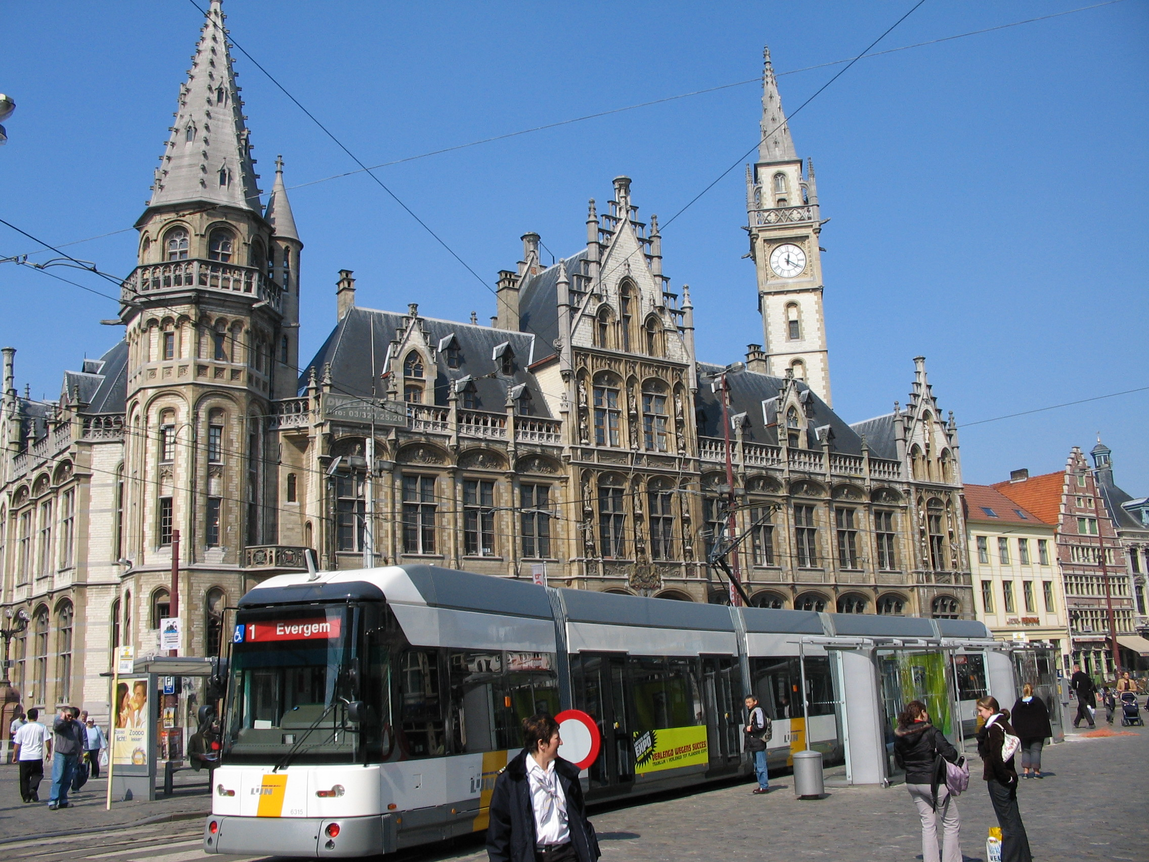 Le tram de Gand à la place Korenmarkt et le shopping center dans l'ancien bâtiment de la poste